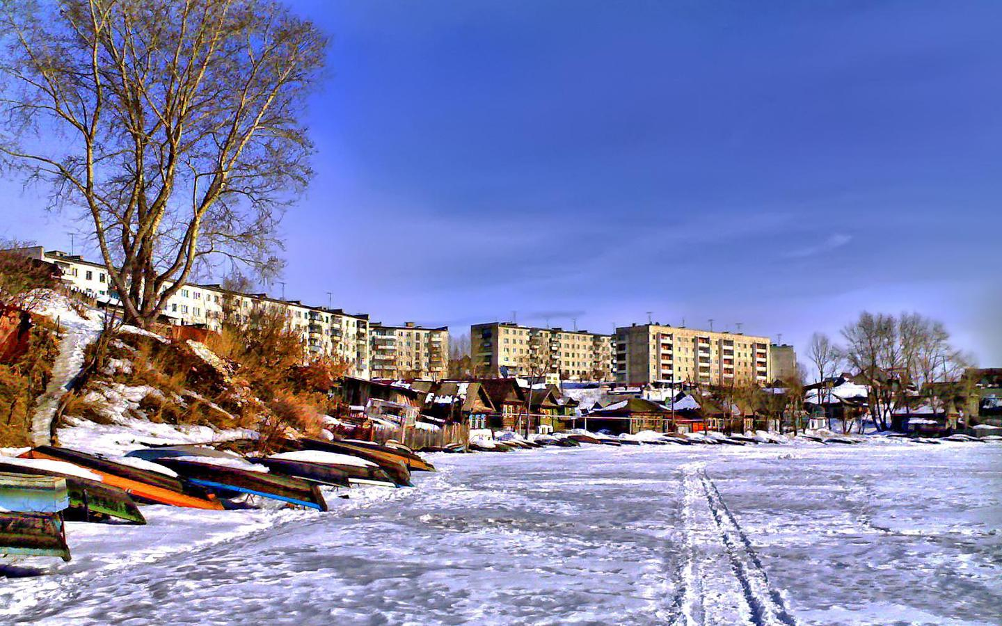 Сатка, городской пруд, лодки на приколе